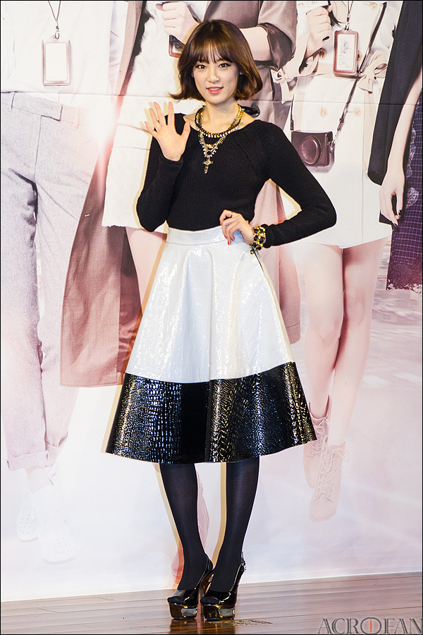 KBS W '애프터스쿨의 뷰티바이블' 제작발표회